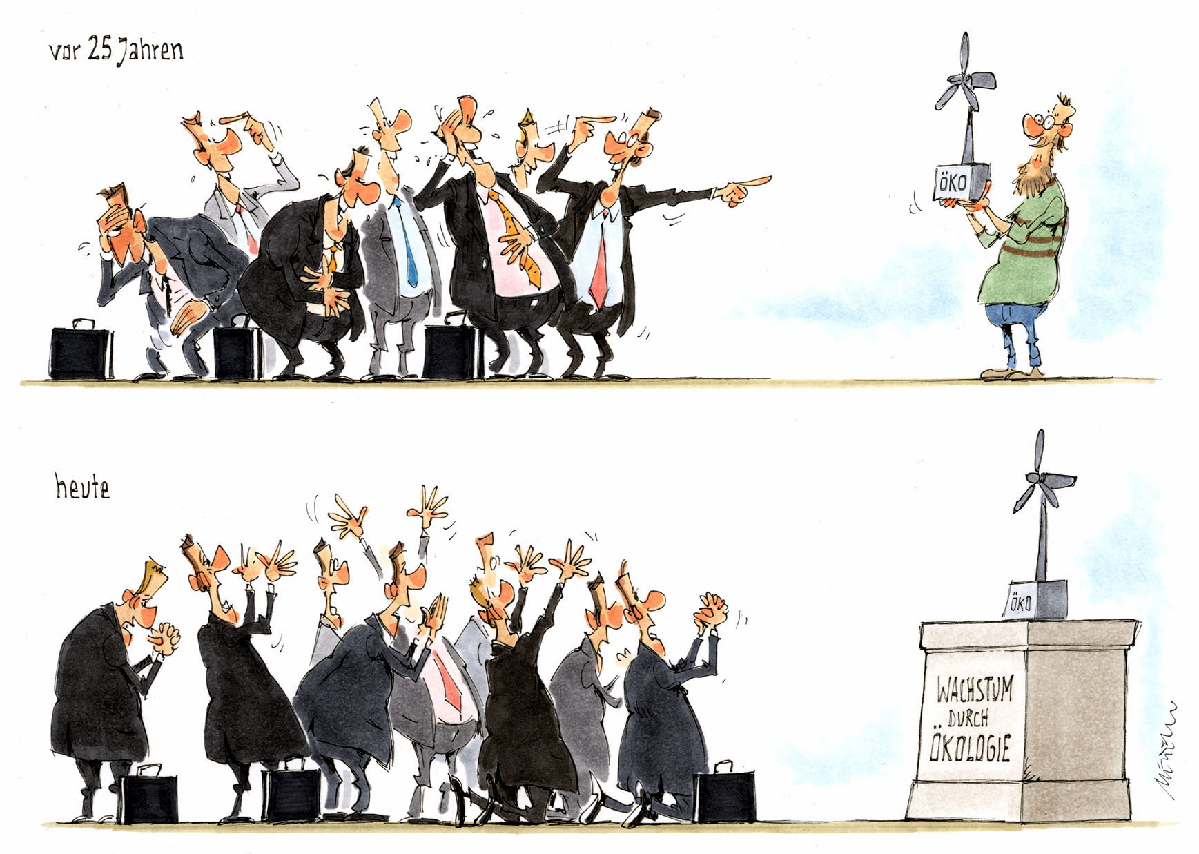 Karikatur von Gerhard Mester zum Thema: Windräder (Stichworte: Erneuerbaren Energien (Alternative Energie), Ökologie, Wirtschaft, Wachstum)